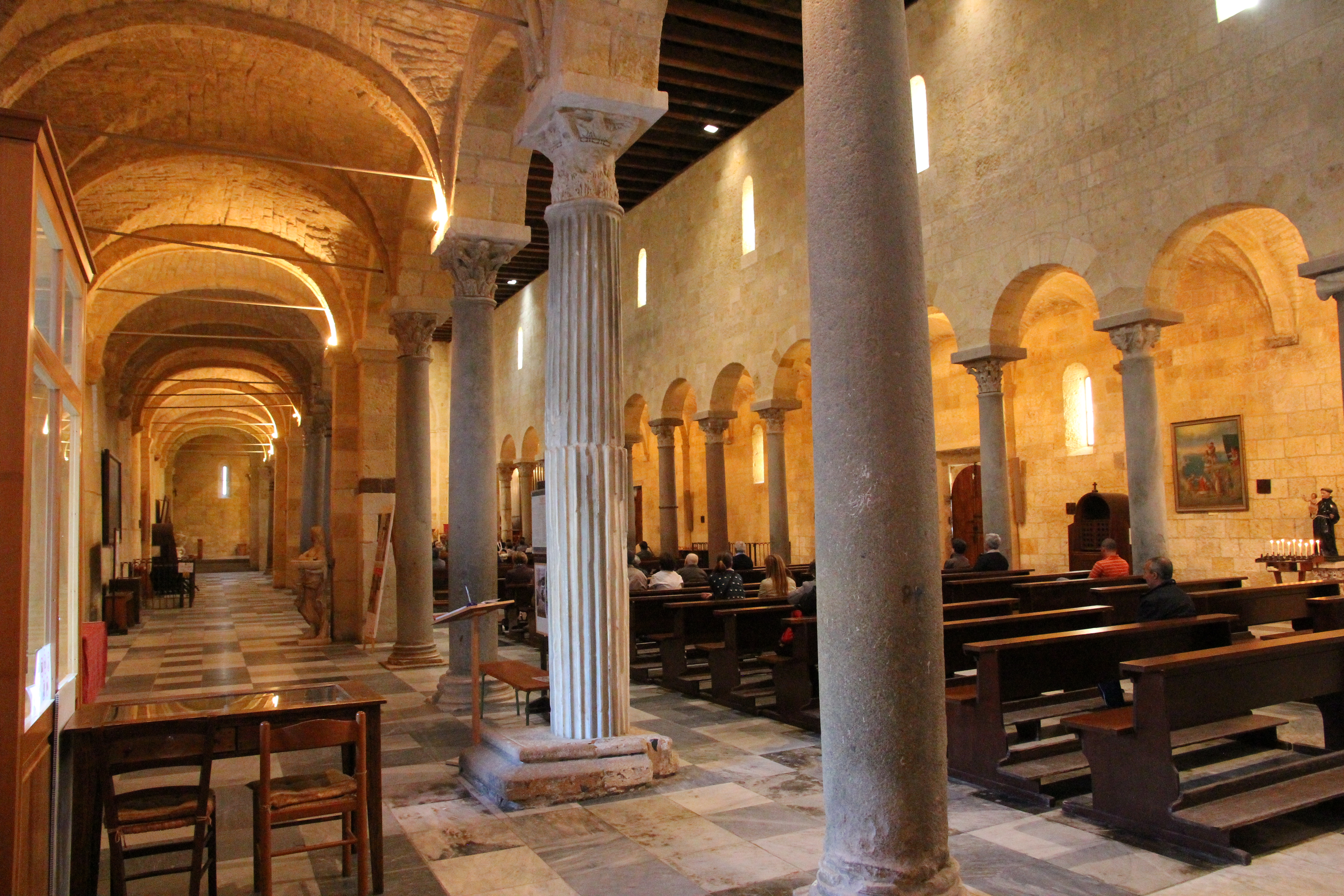 Porto Torres - Basilica romanica di San Gavino